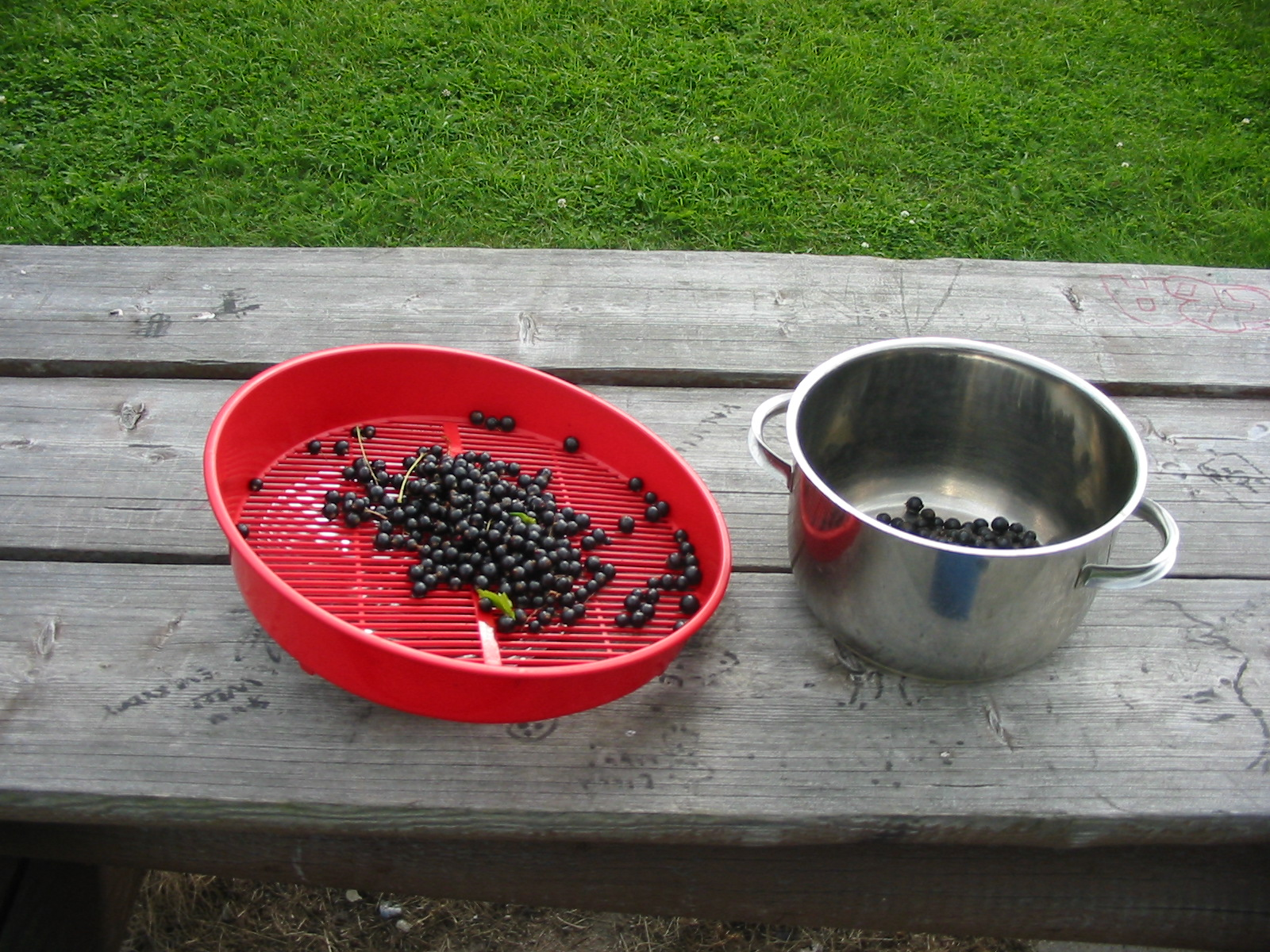 Marjalävikkö